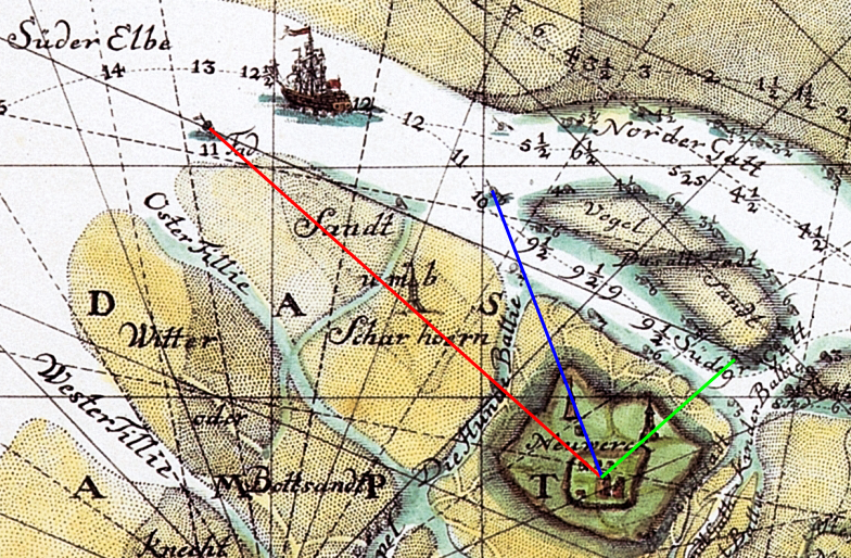 Peilungen über den Neuwerker Turm